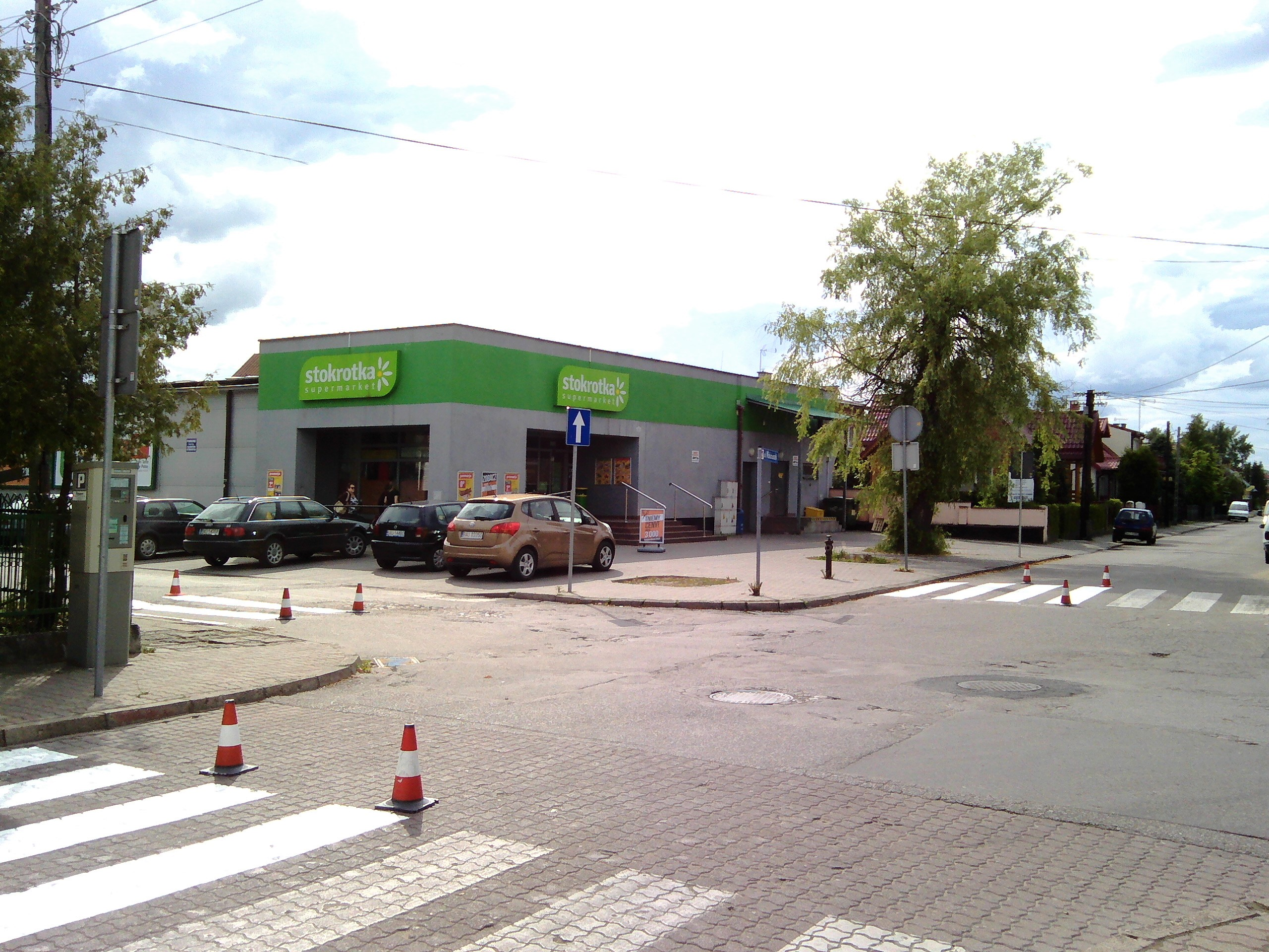 Stokrotka Augustave